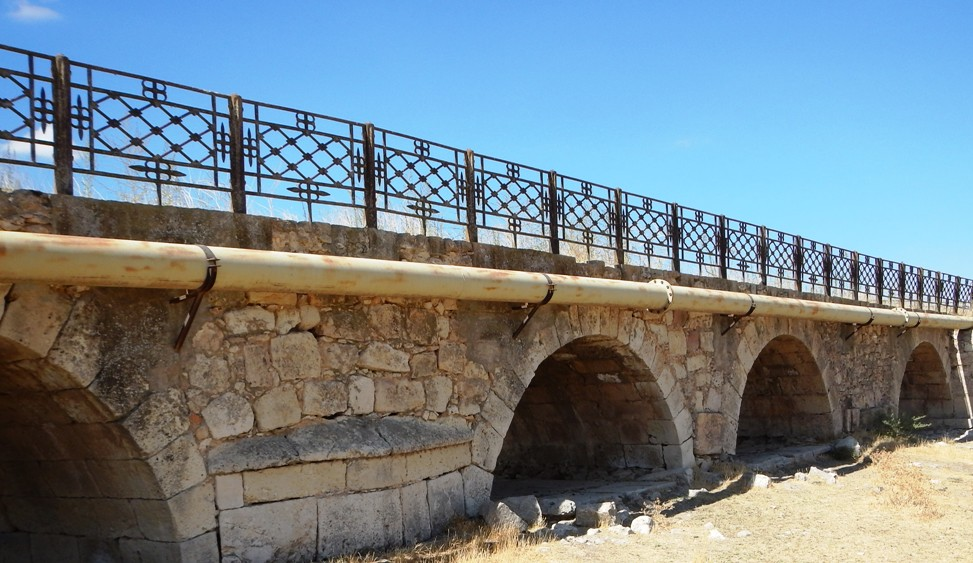 Puente de San Benito situado en el término municipal de Campo de Criptana